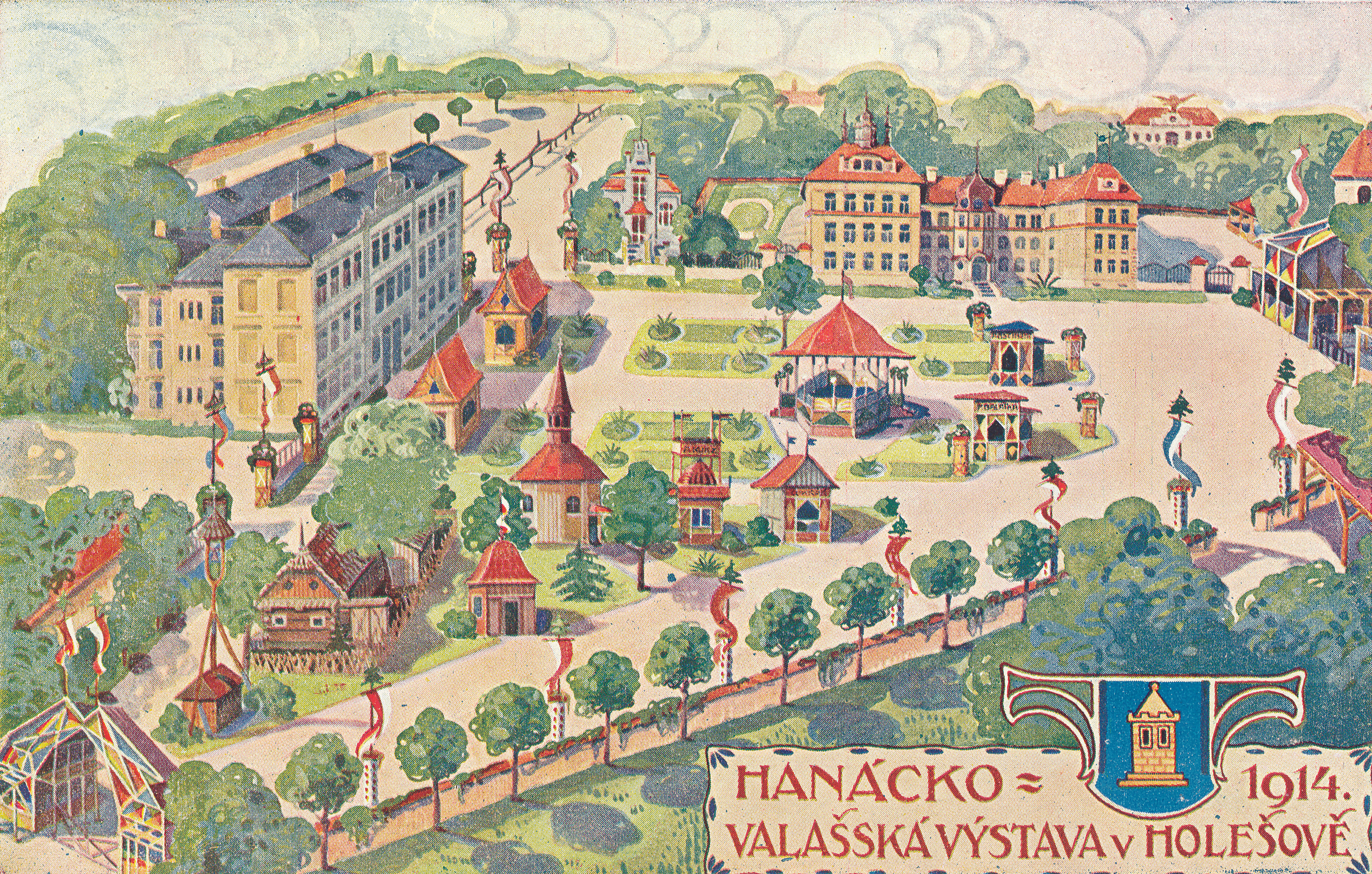 Hanácko-Valašská výstava v Holešově 1914. Přední strana. Na zadní straně červená grafika a text. Neprošlá poštou